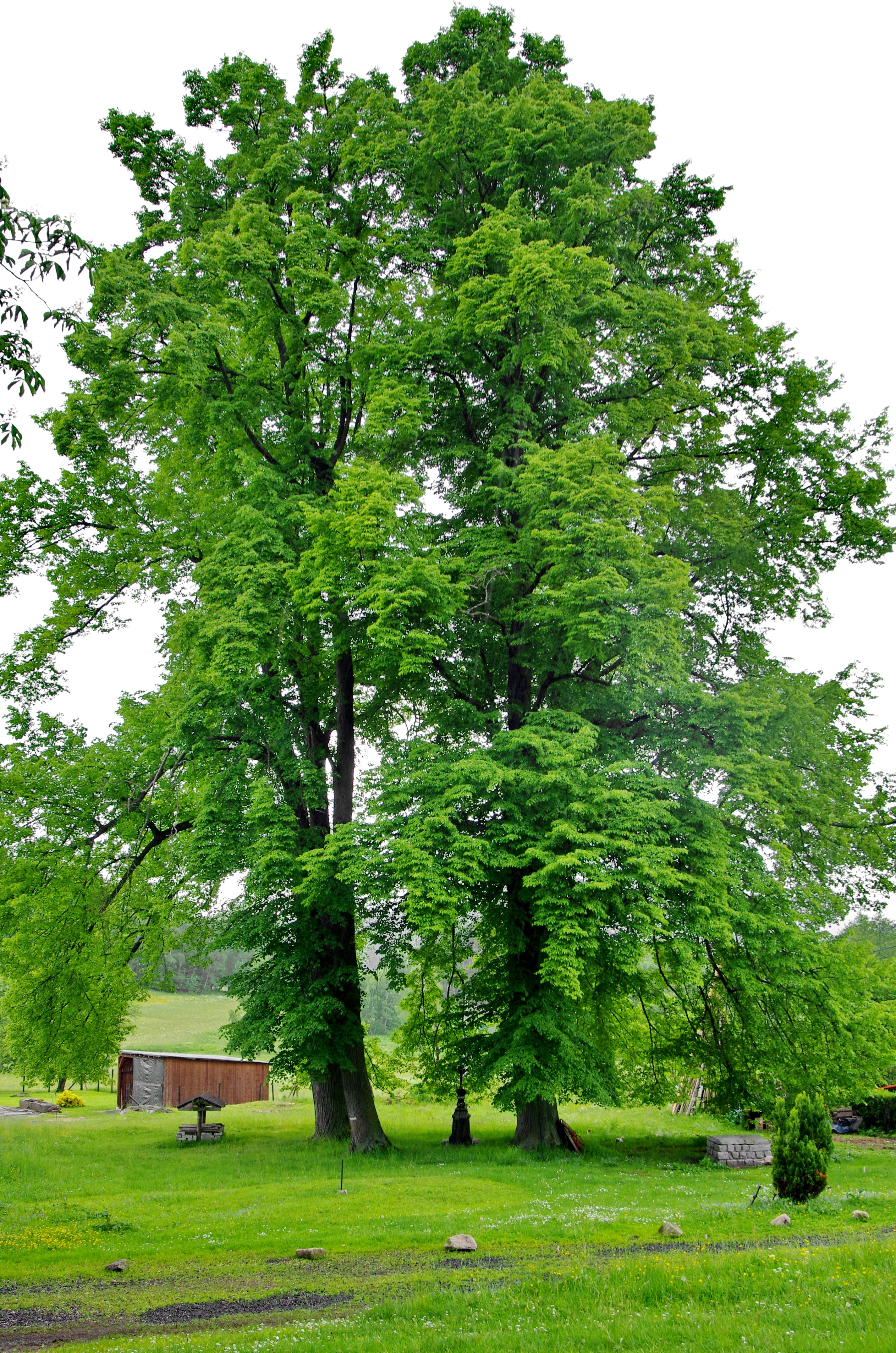 Památné stromy "Čtveřice lip srdčitých u Zimů", osada Tisová, součást města Nejdek, okres Karlovy Vary